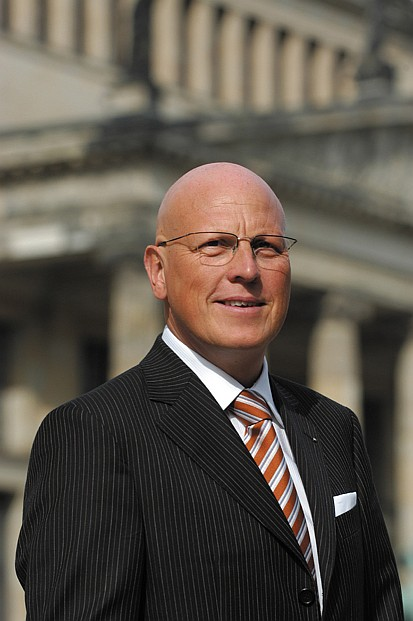 Prof. Dr. Bernt R.A. Sierke